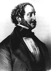 Agénor de Gramont (1819-1880), ministre des Affaires étrangères.